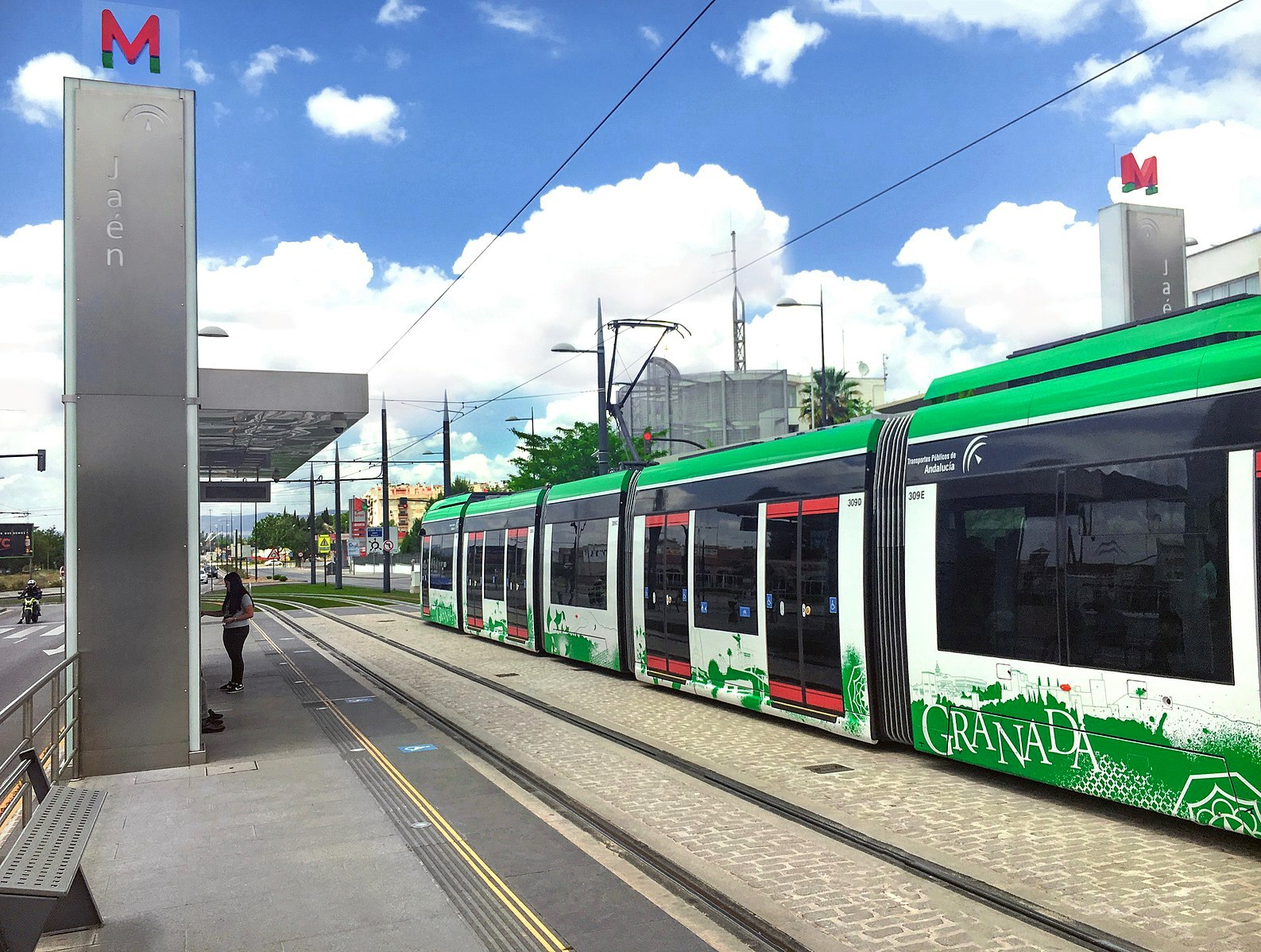 Estación Jaén del Metro de Granada